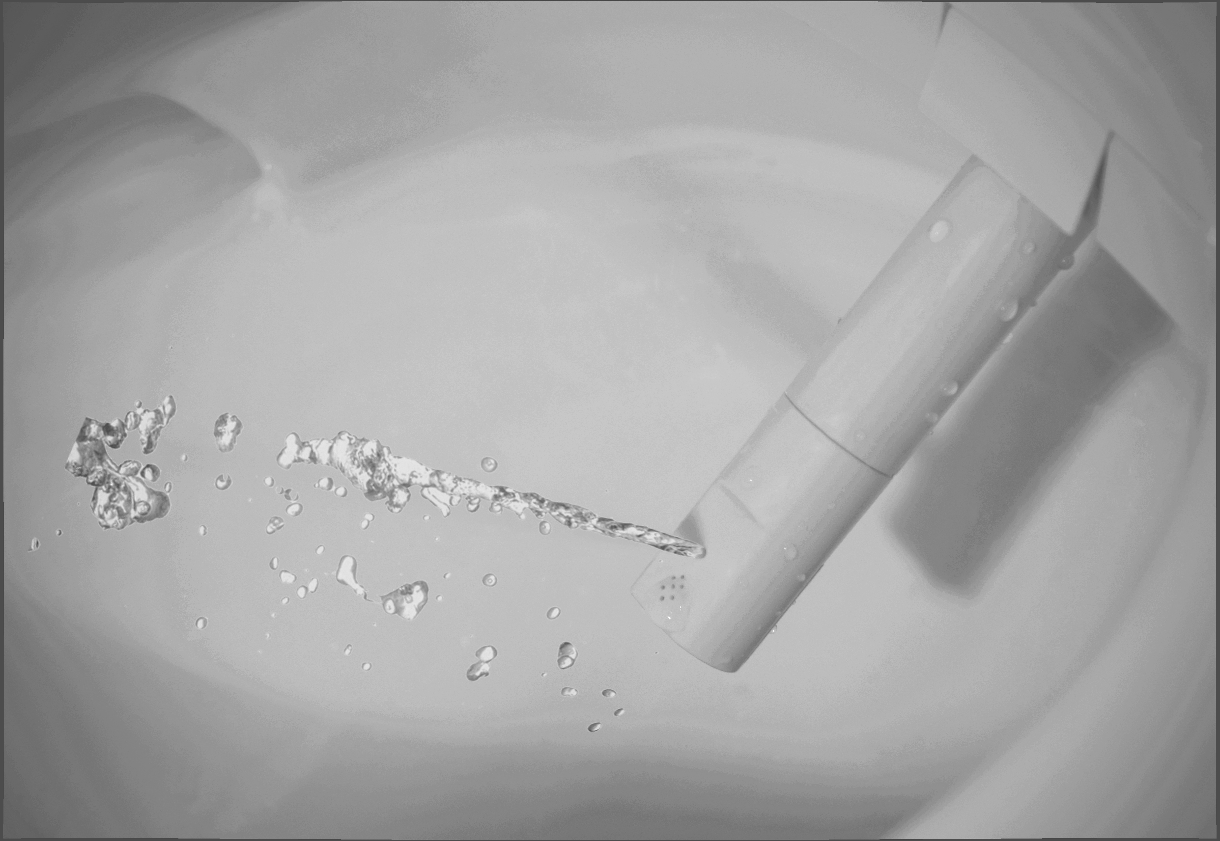 De douchewc sproeit verwarmt water uit de sproeier.